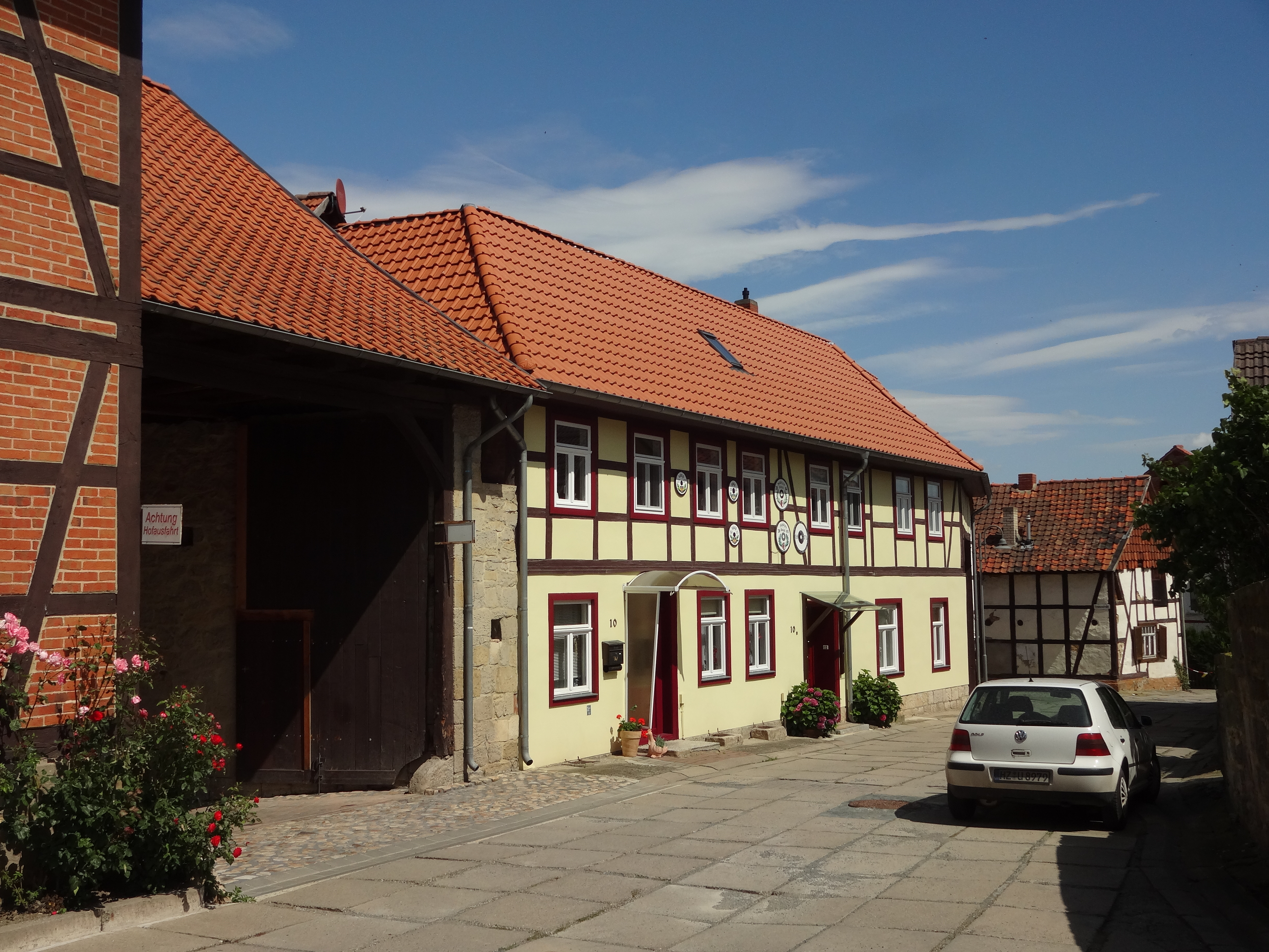 denkmalgeschützter Bauernhof in der Hohen Straße 10 und 10a in Börnecke, Ortsteil von Blankenburg/Harz